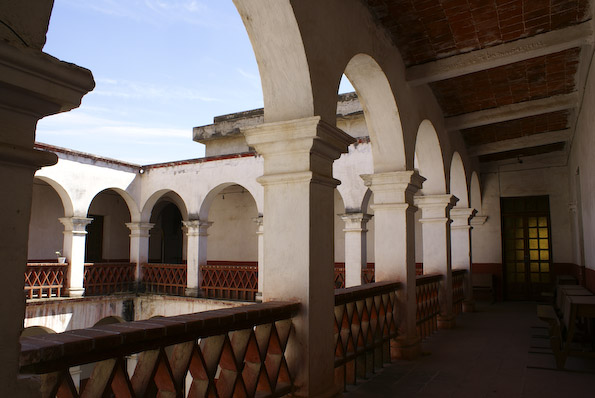 Muestra los patios y pasillos interiores del Exconvento de Calpan